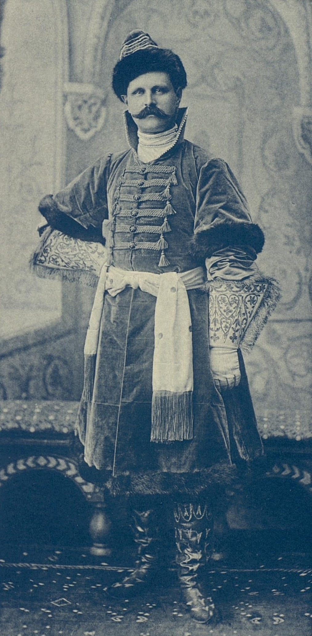 Адъютант его императорского высочества великого князя Сергея Александровича Владимир Федорович Джунковский (Боярин XVII века)